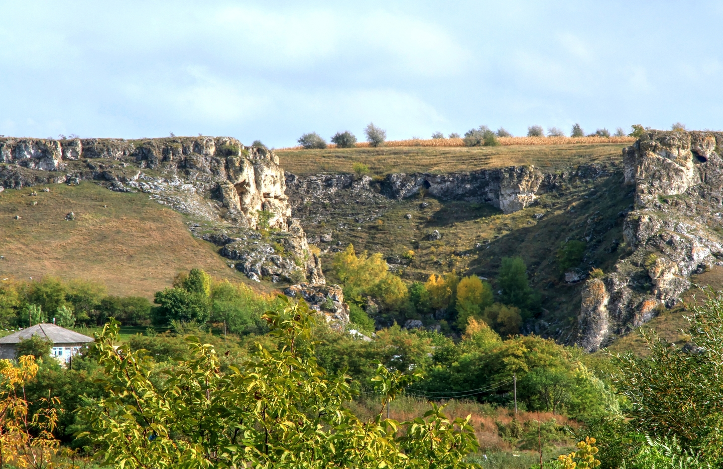 Дуруитоарское ущелье, монумент природы, находится в Рышканский район, Восточнее с. Дуруитоаря (код MD-RS-mn.A-062) A-062